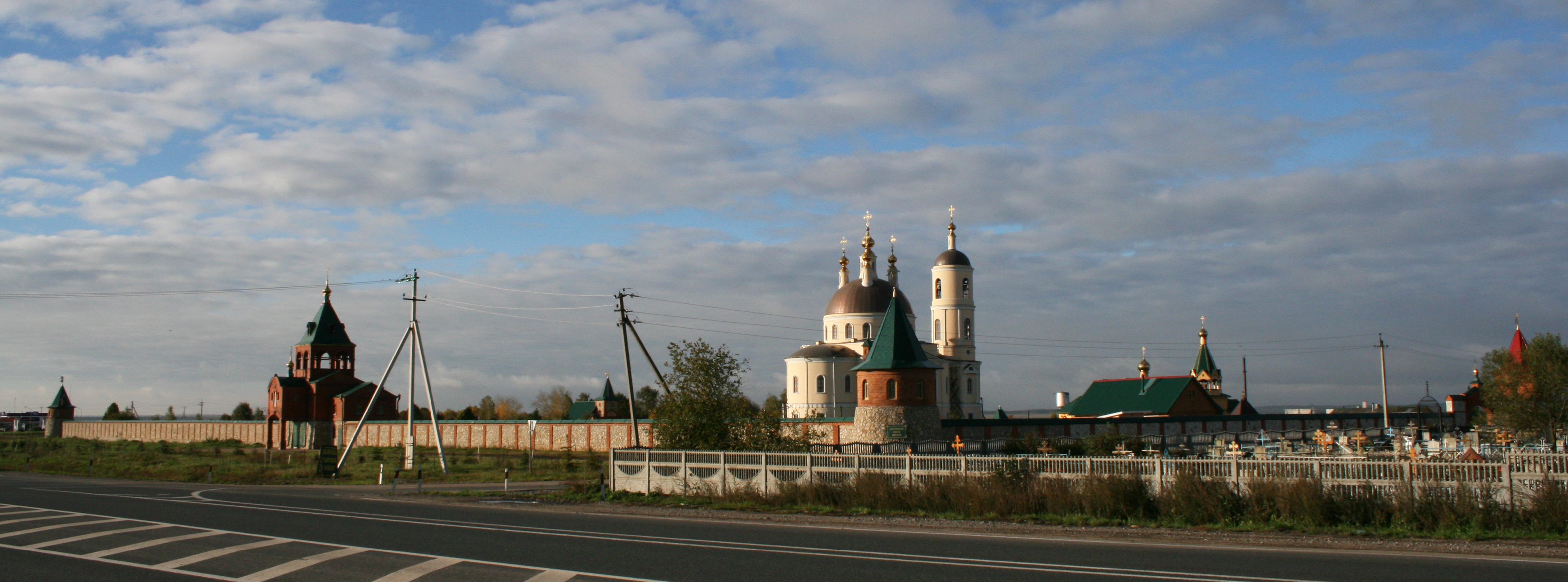 Свято-Покровский женский монастырь г. Михайлов. Рязанская митрополия РПЦ.